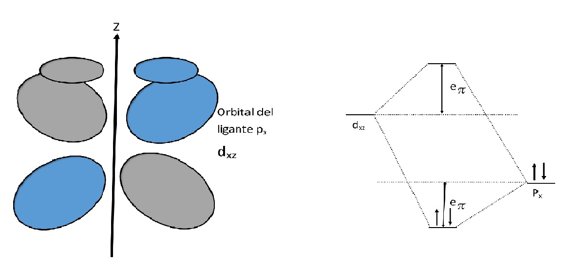 orbitales pi donador con desdoblamiento